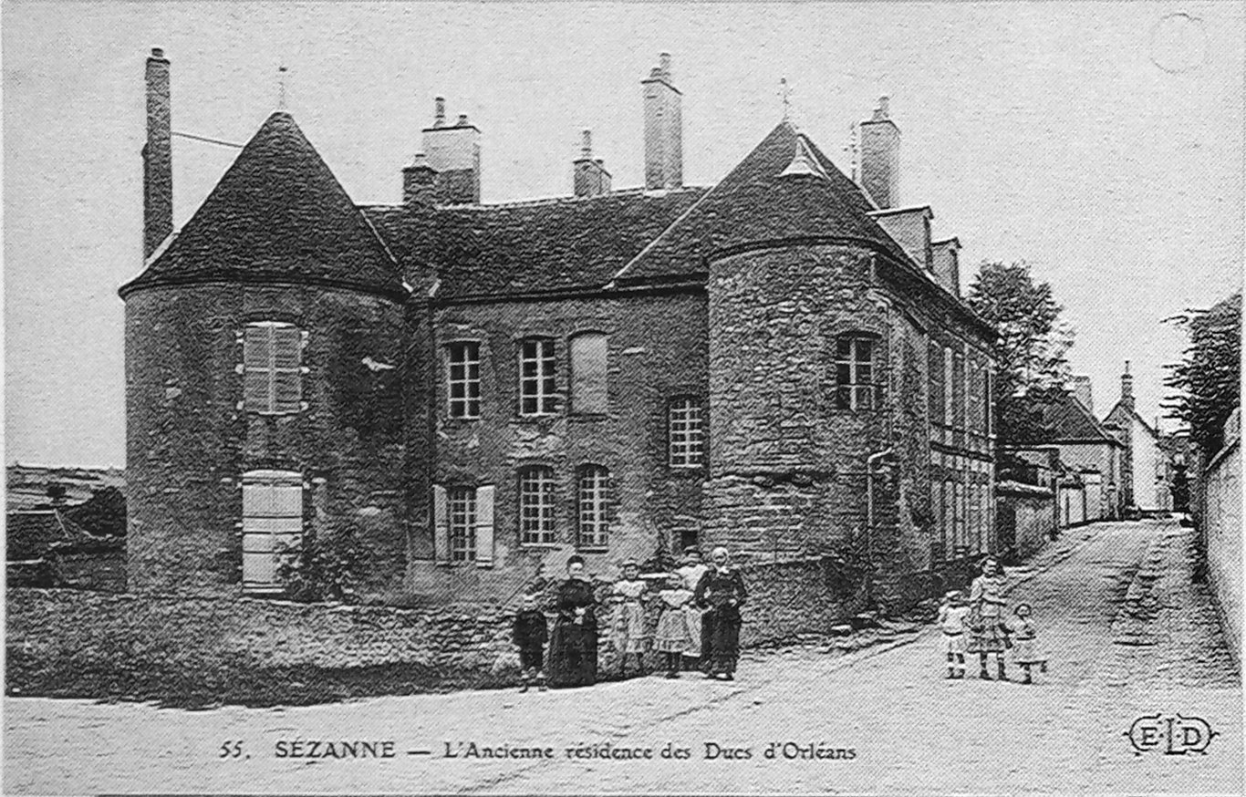 sur une vue ancienne.